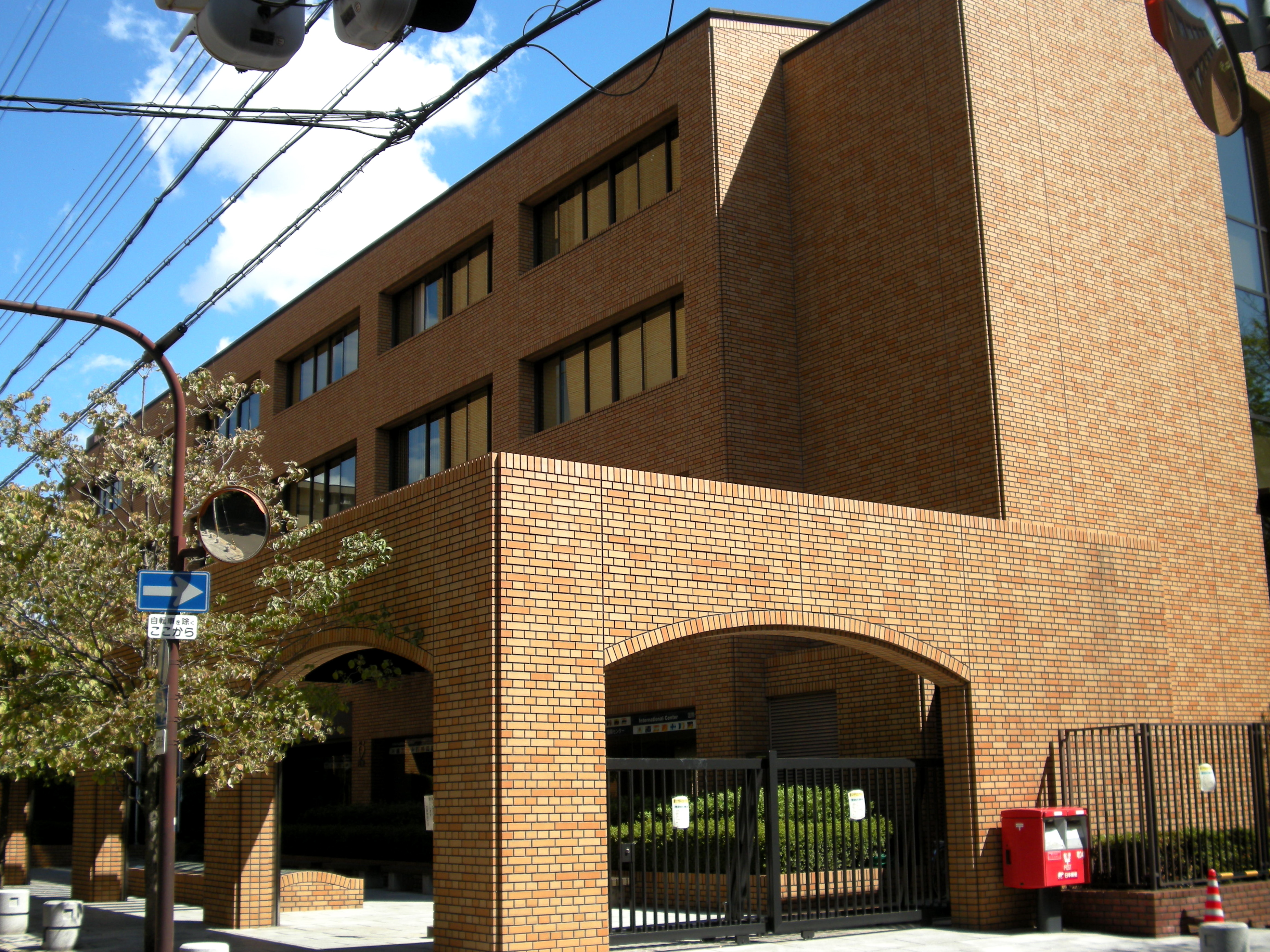 School Building at Osaka Gakuin University (Osaka, Japan)